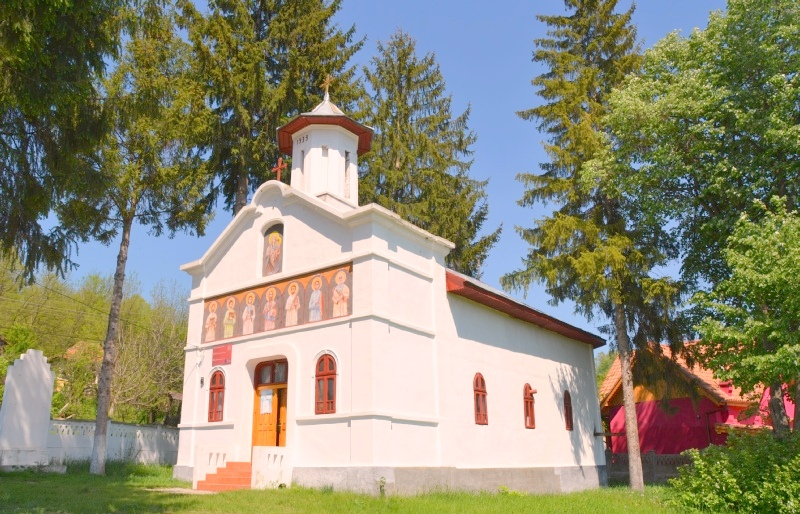 Biserica „Intrarea Maicii Domnului în Biserică”, sat Govodarva; comuna Căzănești În centrul satului 1813